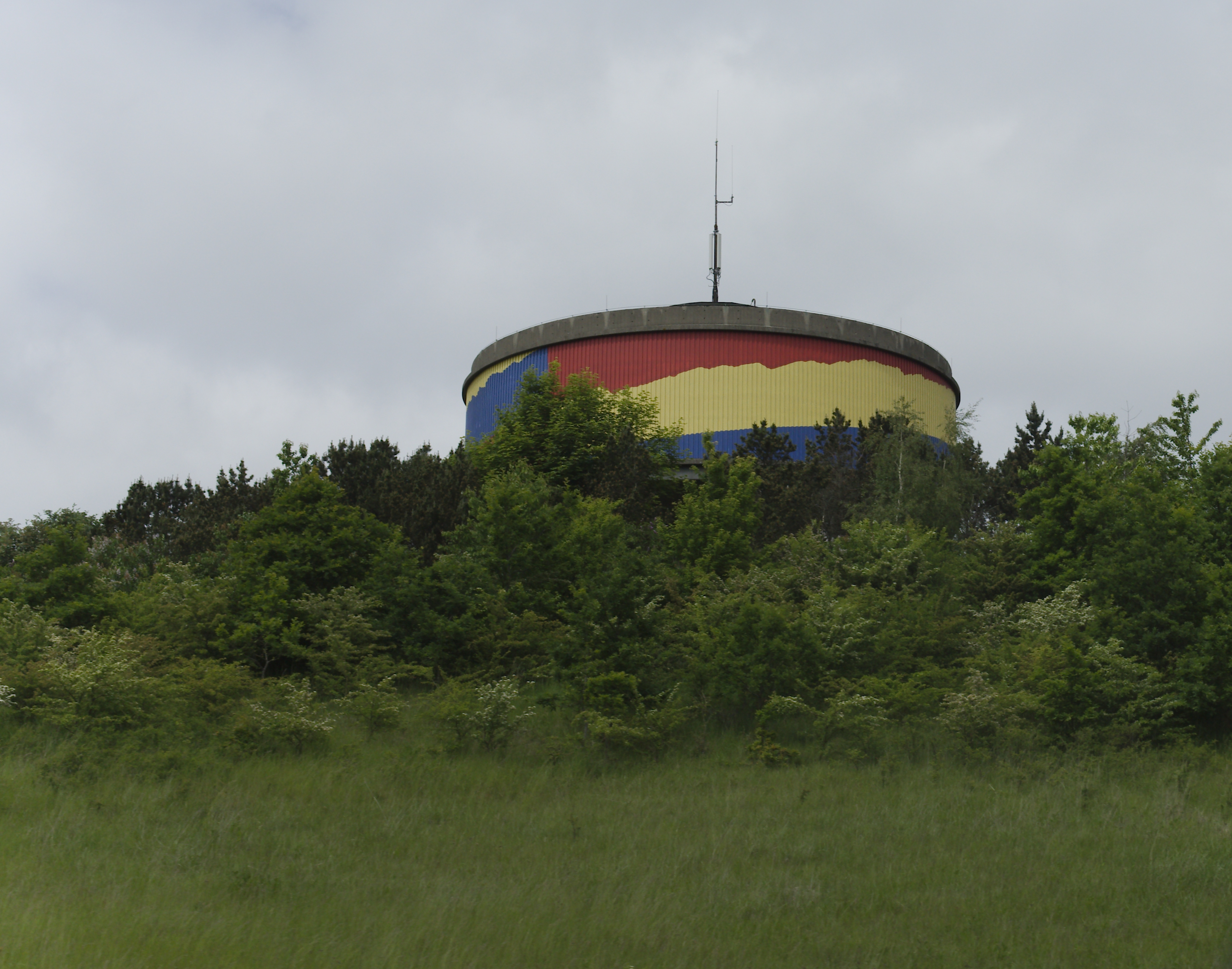 Sorø vandtårn (Pedersborg) set fra motorvejen